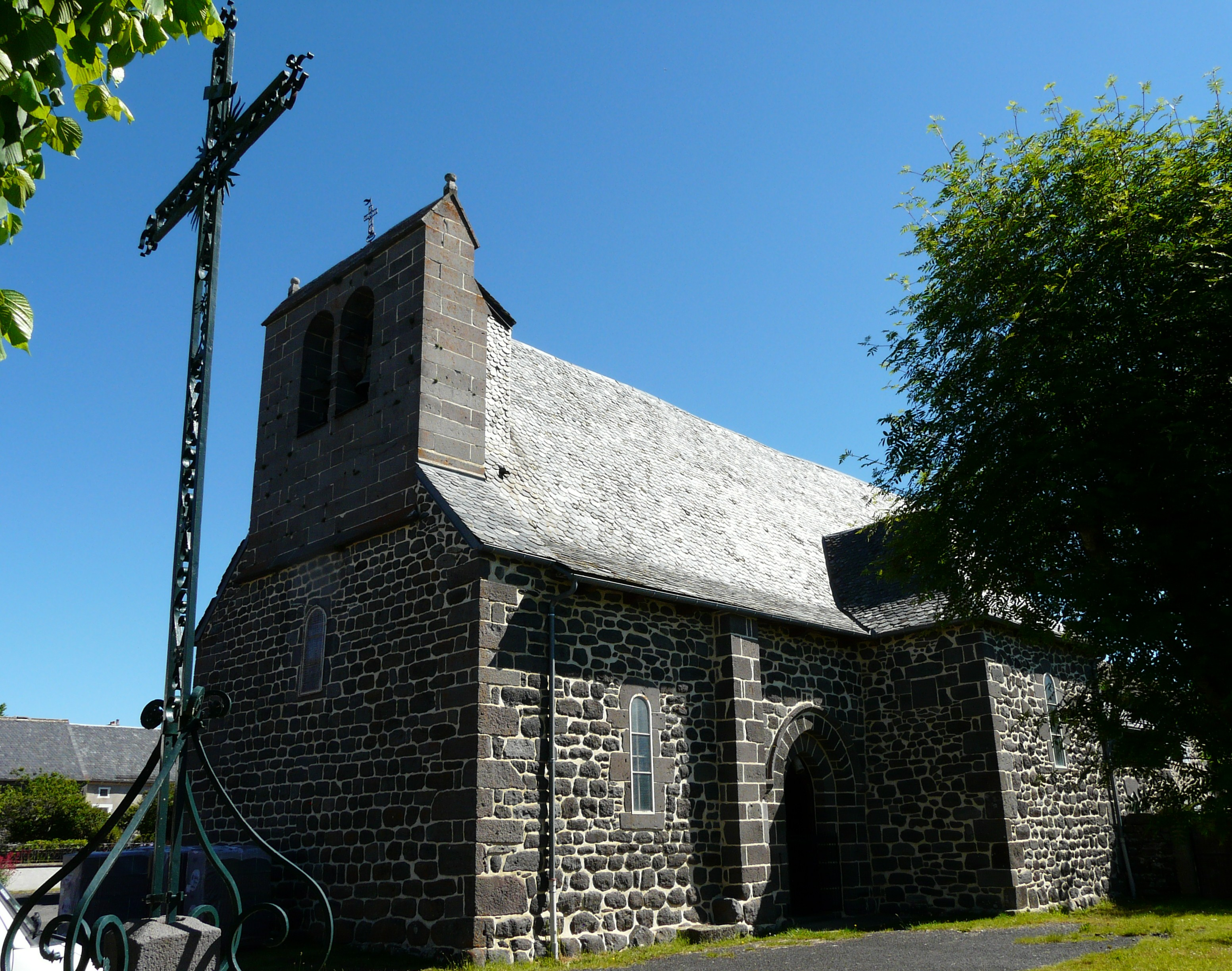 L'église de Sériers, Cantal, France.